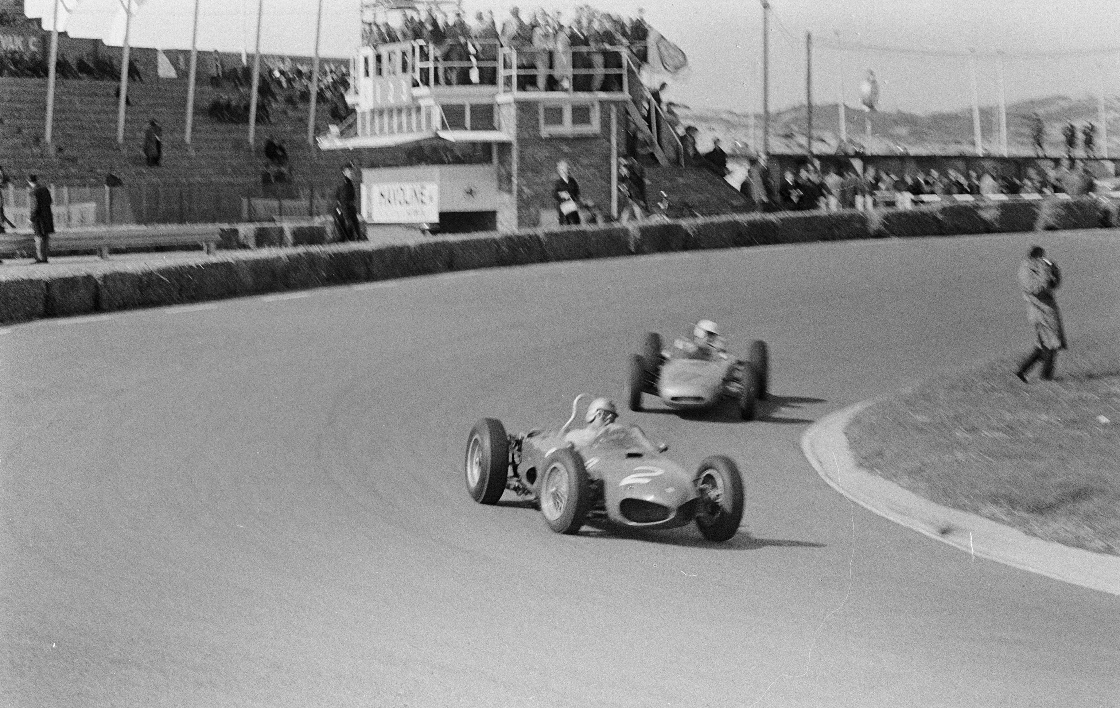 Trainingsritten op Circuit van Zandvoort.